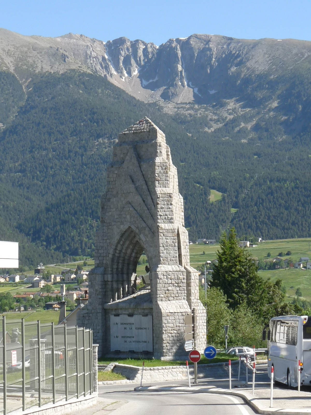 Monument Emmanuel Brousse, La Cabanasse, Pyrénées-Orientales, France